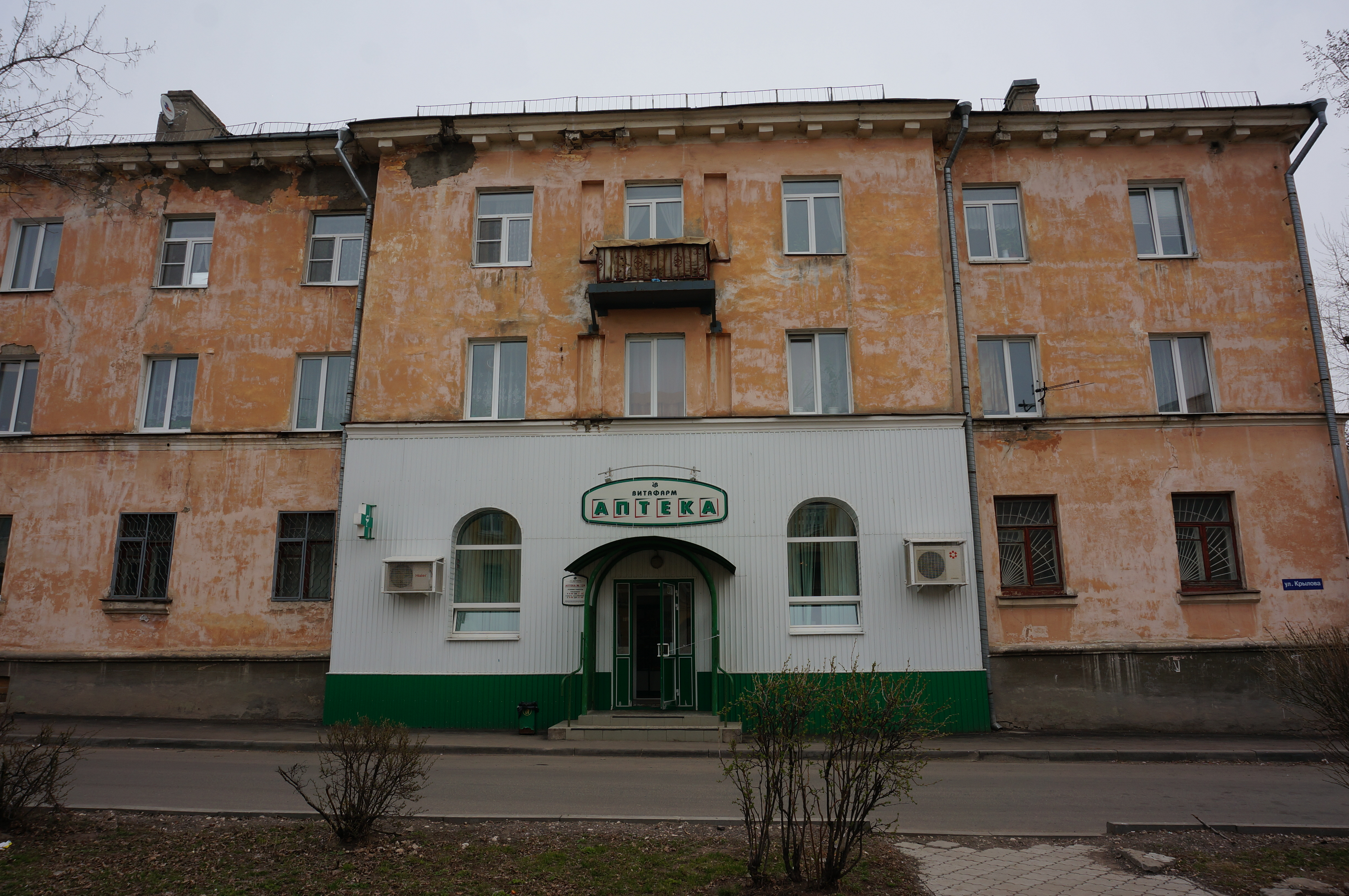 Здание жилого дома по адресу ул. Никонова, 10 (Крылова 2, Носова 9, Тольятти, Россия) построено в 1957 году. Архитекторы: В. П. Мухин и И. Г. Ромм. Жилой трехэтажный дом на 48 квартир построен по типовому проекту Ленгипрогора, застройщиком выступил Судоремзавод. Здание П-образной формы, так что фасады здания выходят на три улицы, на первом этаже расположена аптека. Фасад со стороны улицы Крылова